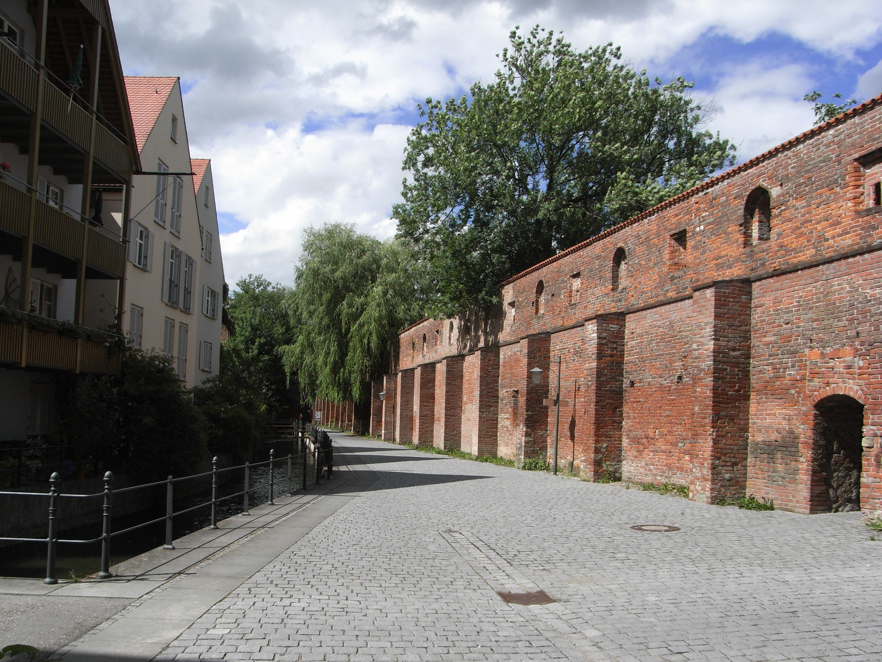 Stadtmauer zwischen Bettelturm und Luginsland (Ulmervorstadt)